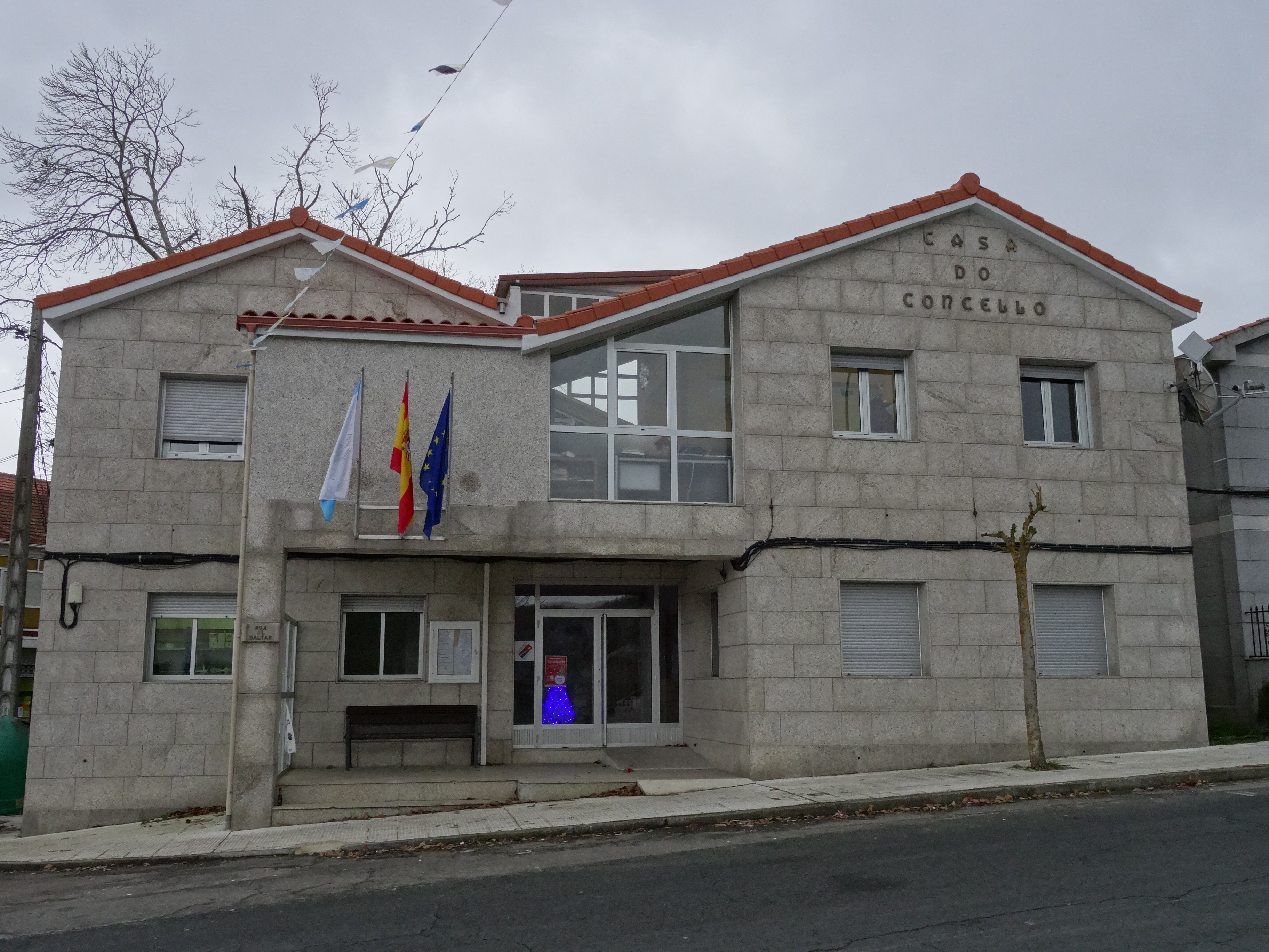 Casa do concello dos Blancos, Ourense.